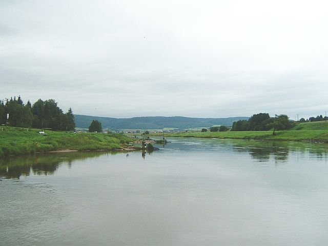 Foto aufgenommen auf der Weserfähre (Wahmbeck-Gewissenruh) bei Wahmbeck, Ortsteil von Bodenfelde. Im Hintergrund ist ein Teil von Bodenfelde zu erkennen.